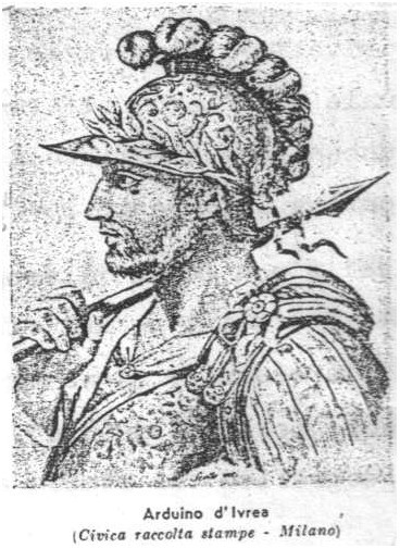 arduino d'ivrea, roi d'italie